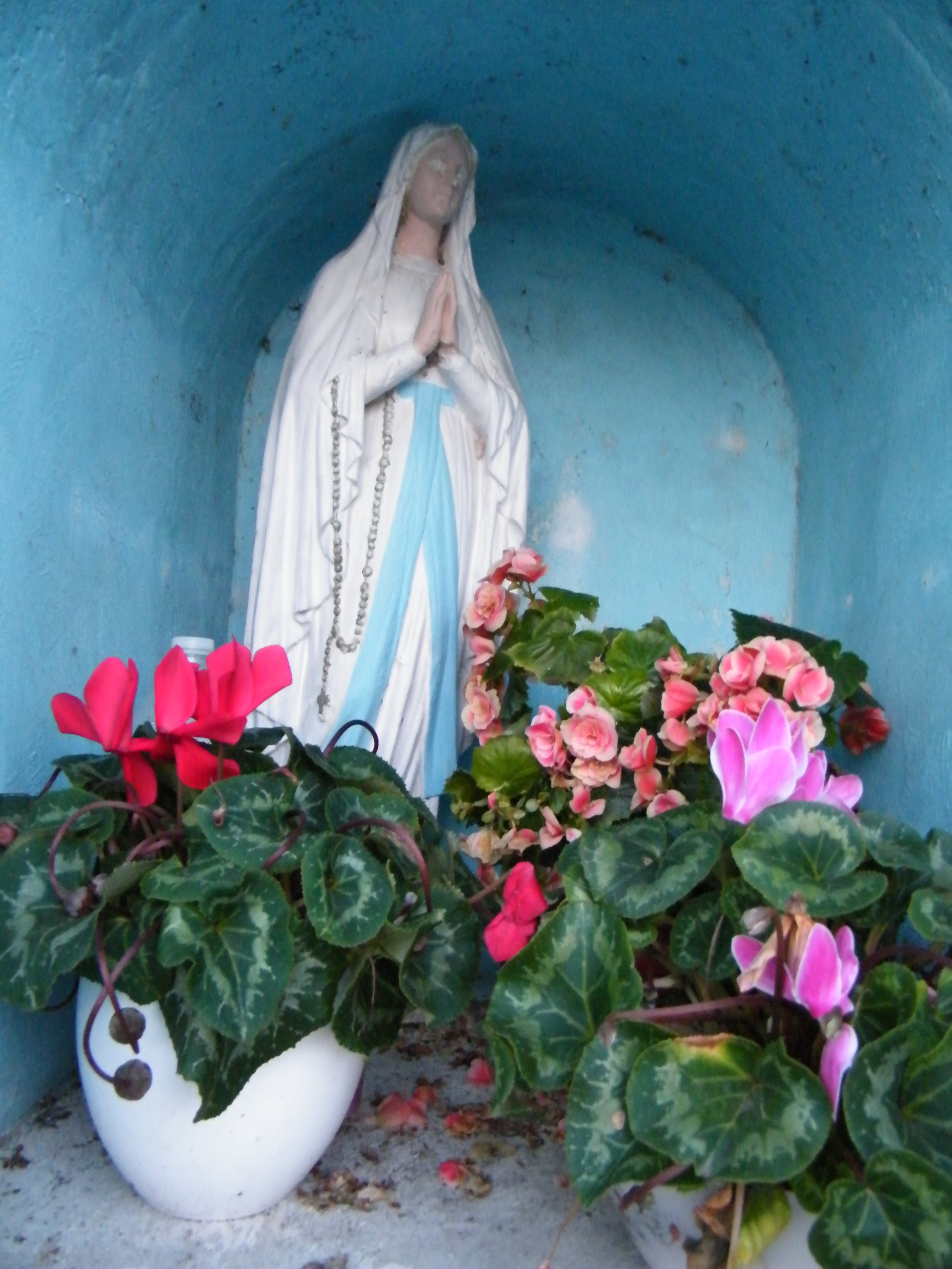 Chapelle Notre-Dame des 4 chemins à Forest-Montiers